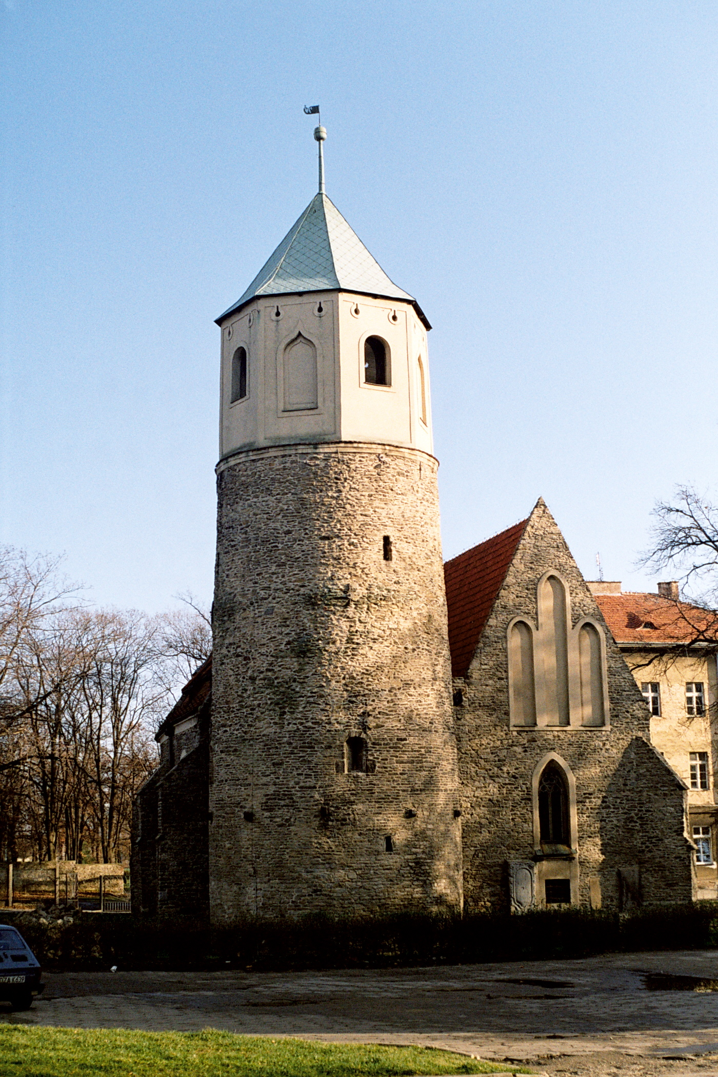 Praca własna-Prometheus - wykonano 7 grudnia 2006 aparatem Praktica BCA electronic